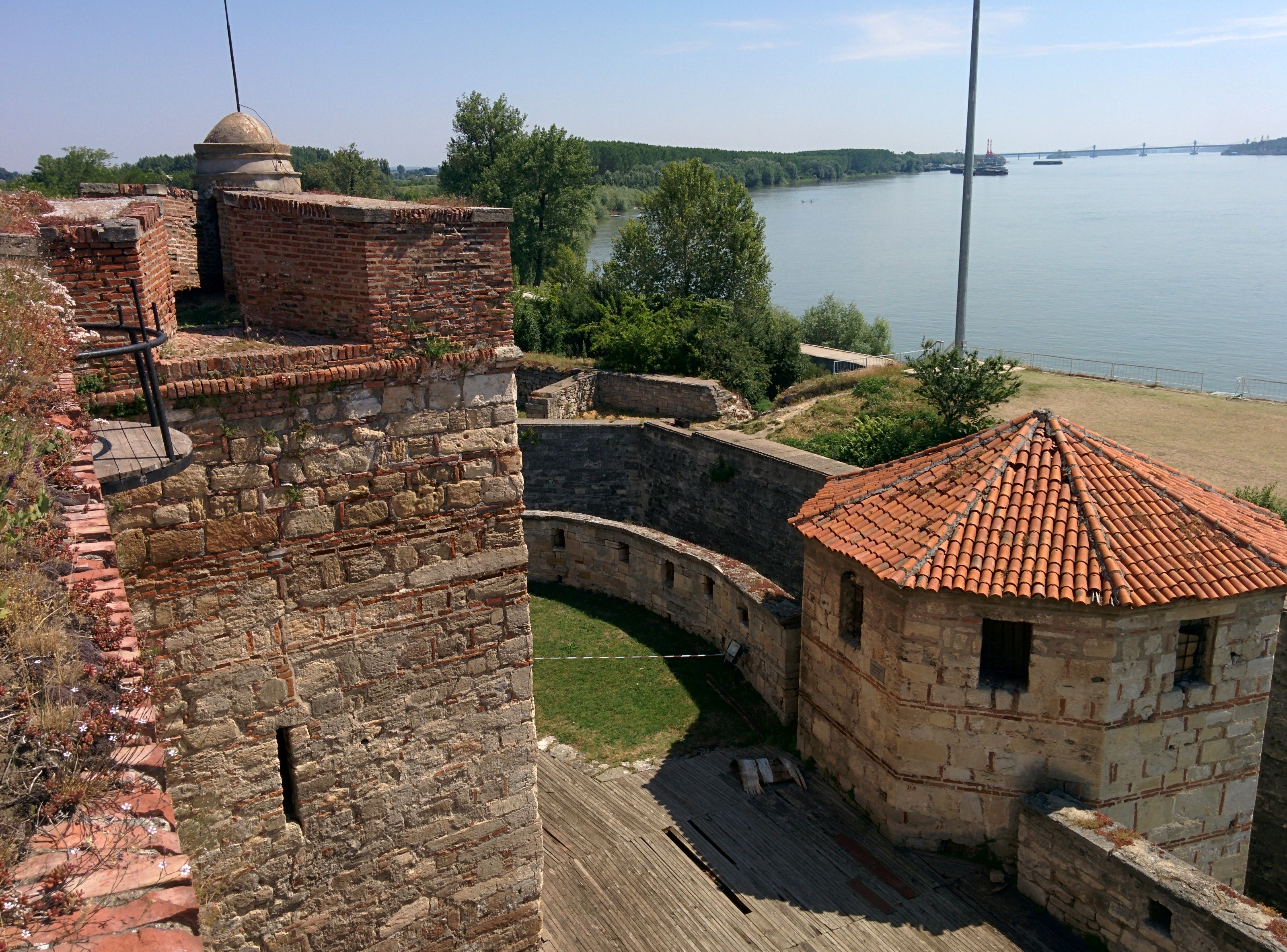 Крепостта Баба Вида